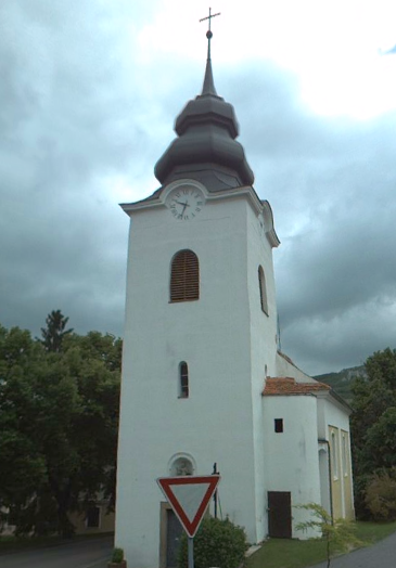 kostel v obci Bavory